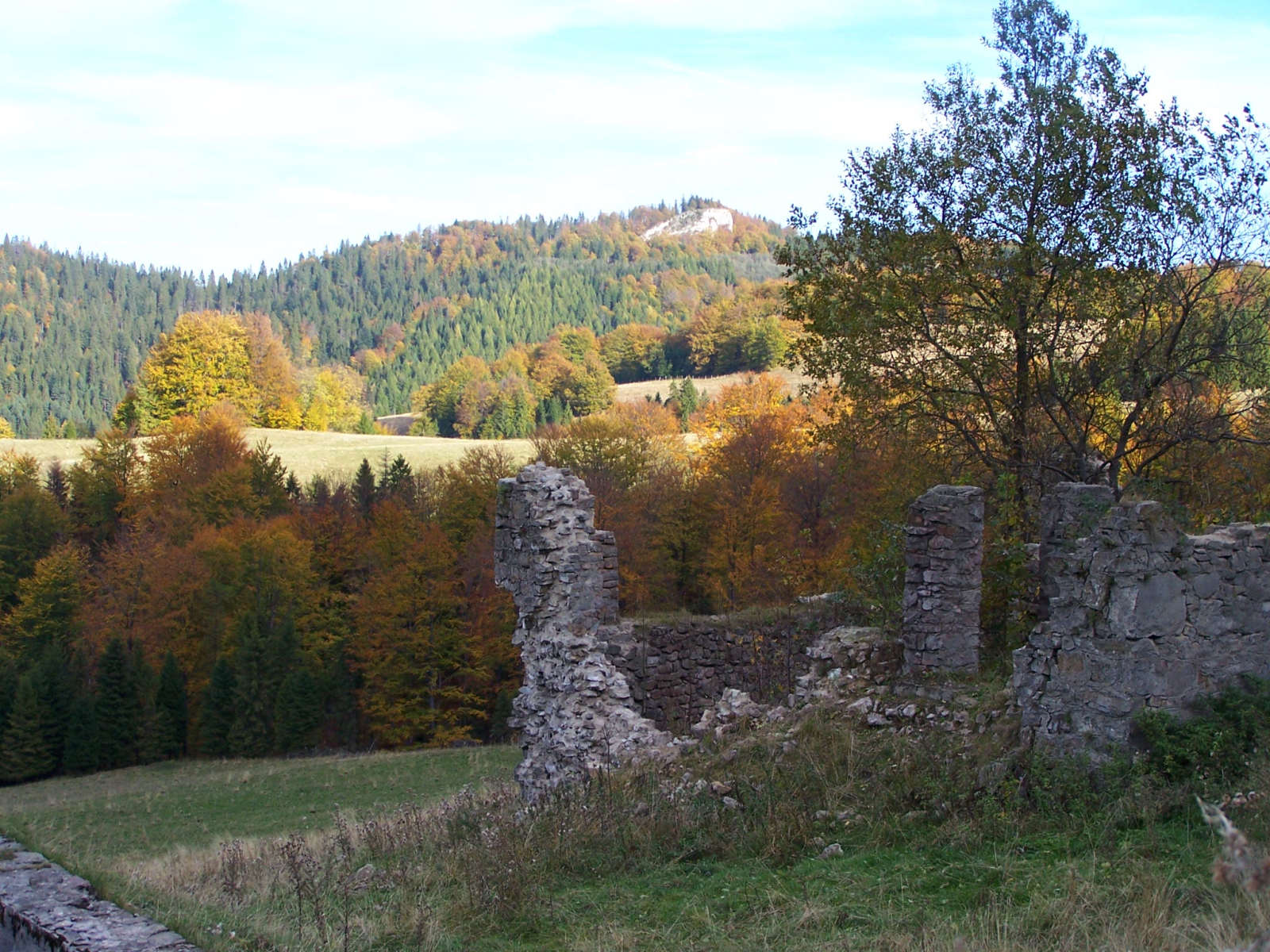 Polana pod Wysoką (Małe Pieniny)